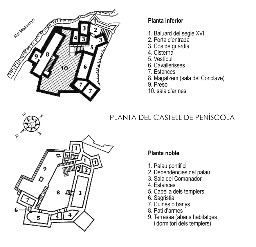 Planta del castell de Peníscola (Baix Maestrat) / Plan of the Peníscola castle (Baix Maestrat).